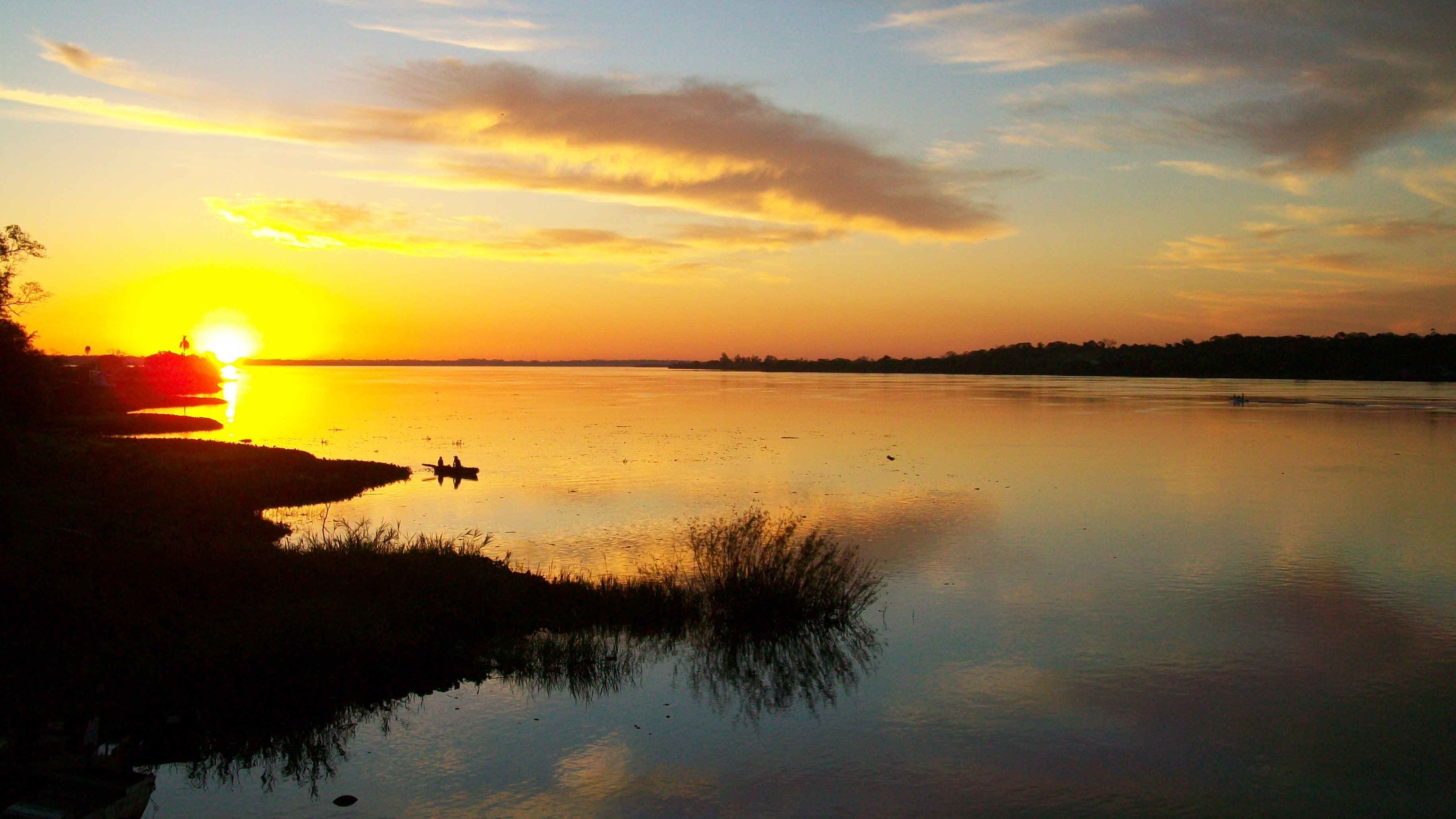 Atardecer en el Río Paraná, en Candelaria, provincia de Misiones, Argentina. A 35 km de la ciudad de Posadas, en una zona donde se estrecha el río. Por este paso cruzó Manuel Belgrano en su expedición al Paraguay.